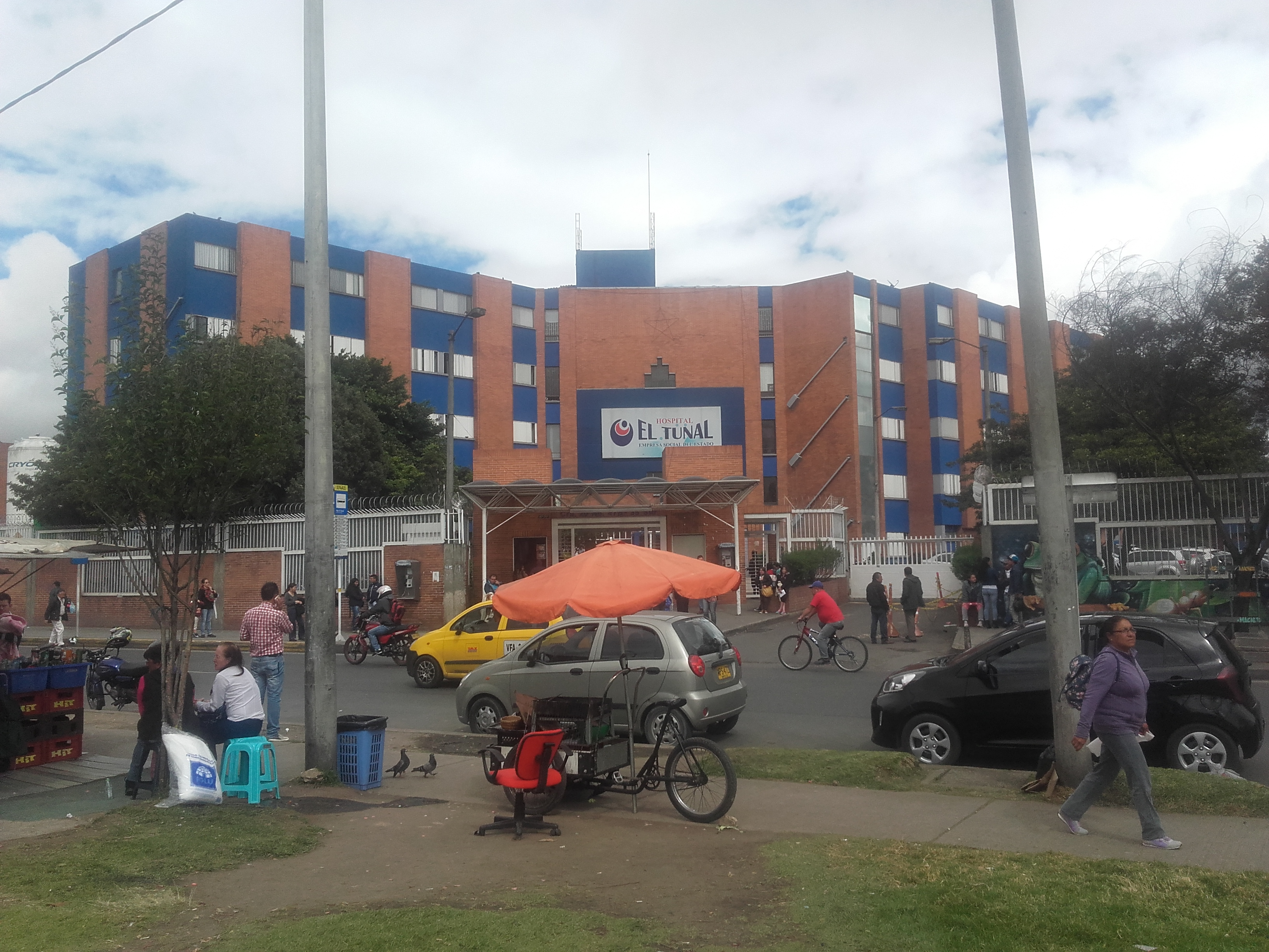 hospitales